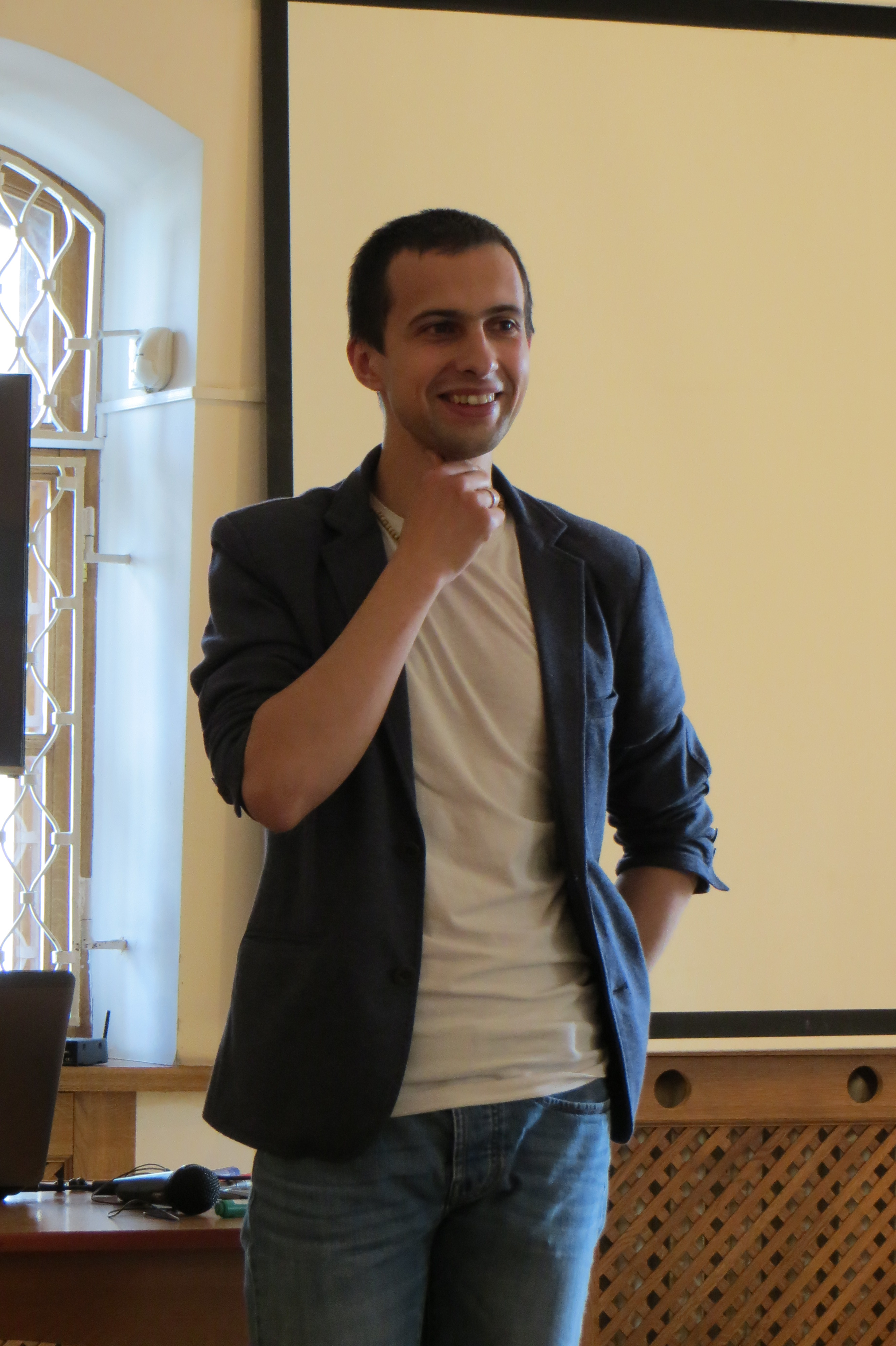 Любко Дереш під час своєї лекції 16 травня 2015 у Музеї книги